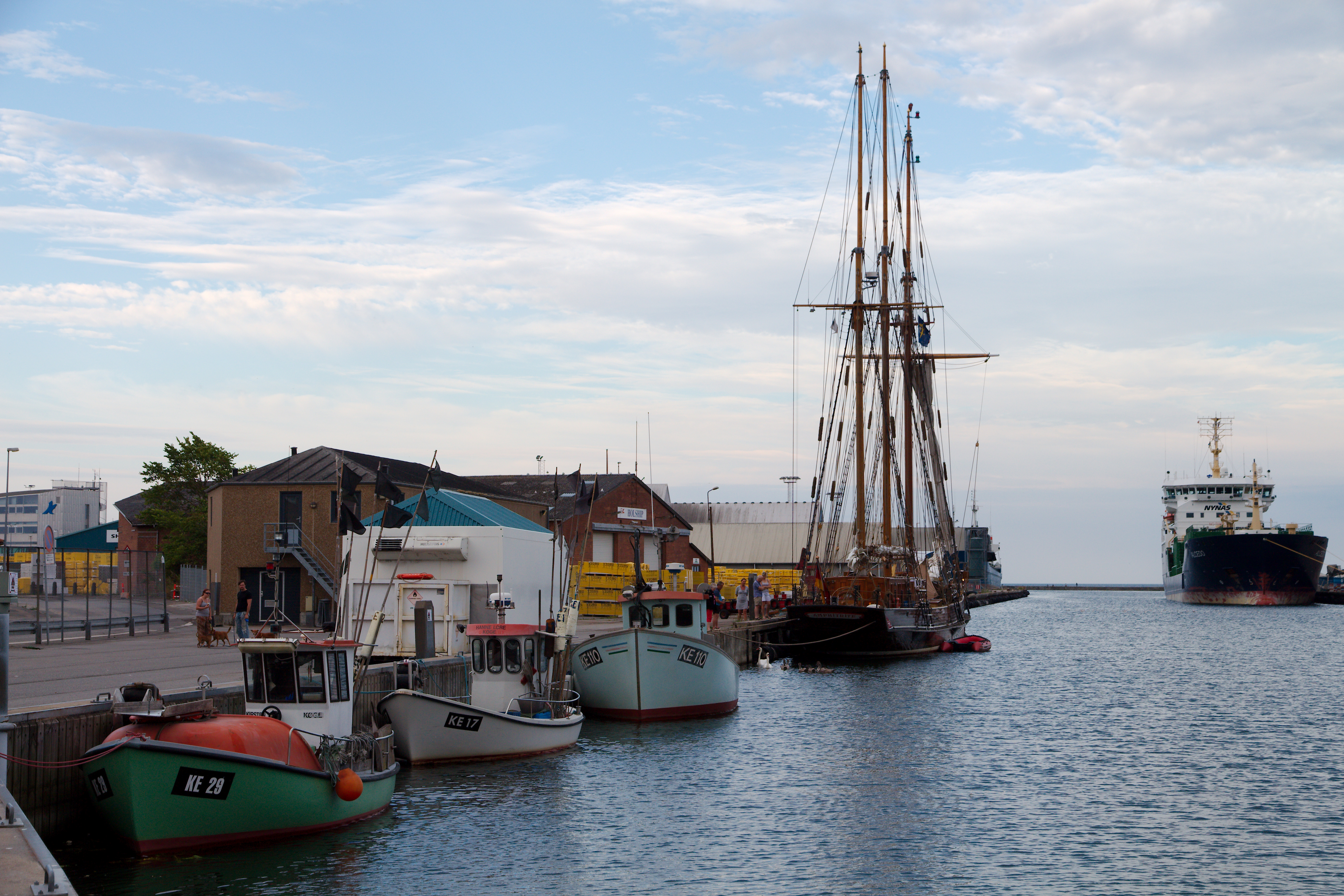 @Køge